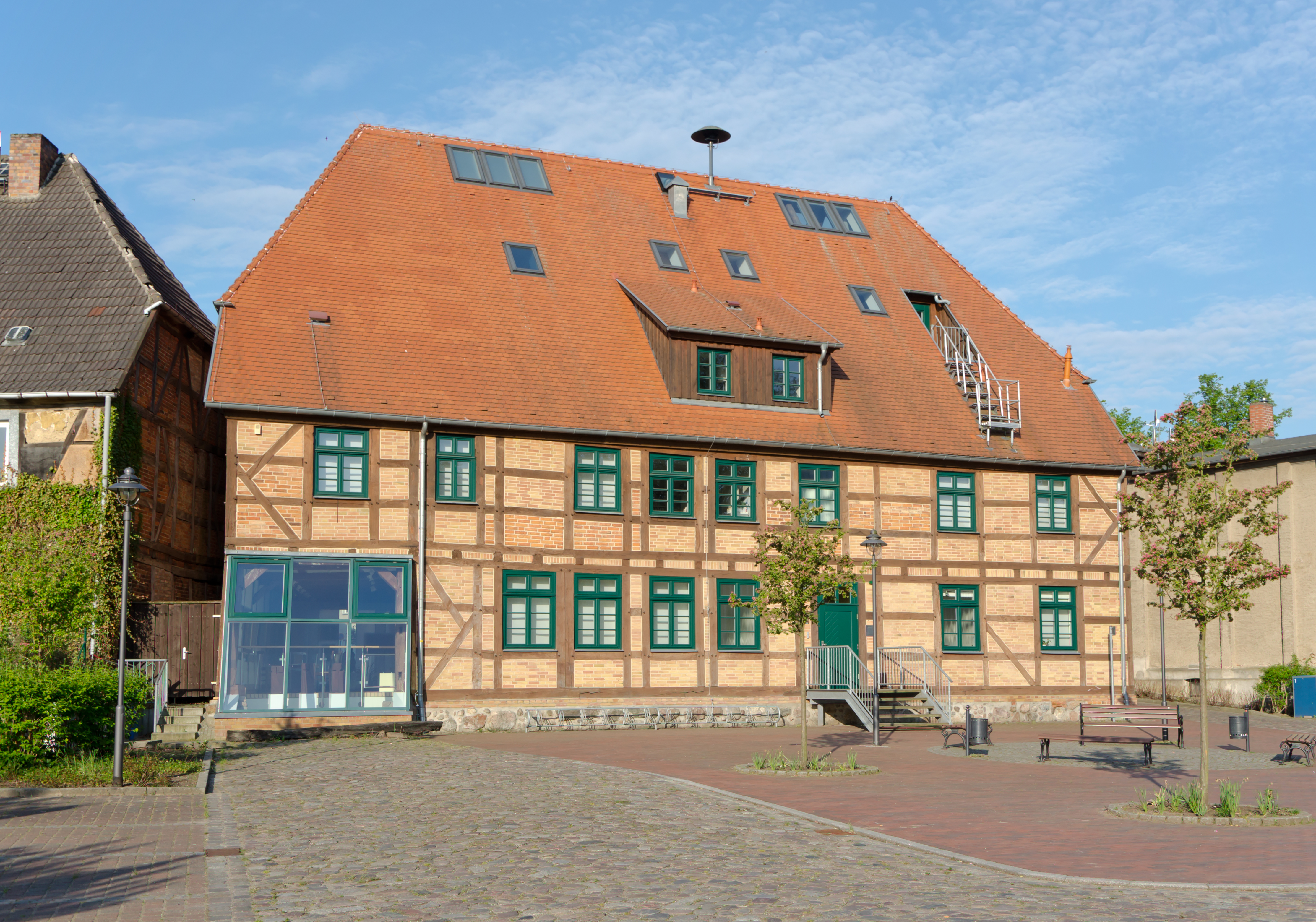 Schwaan, Wassermühle